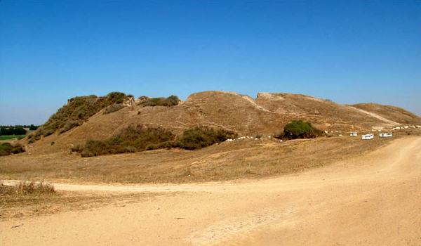 תל גמה